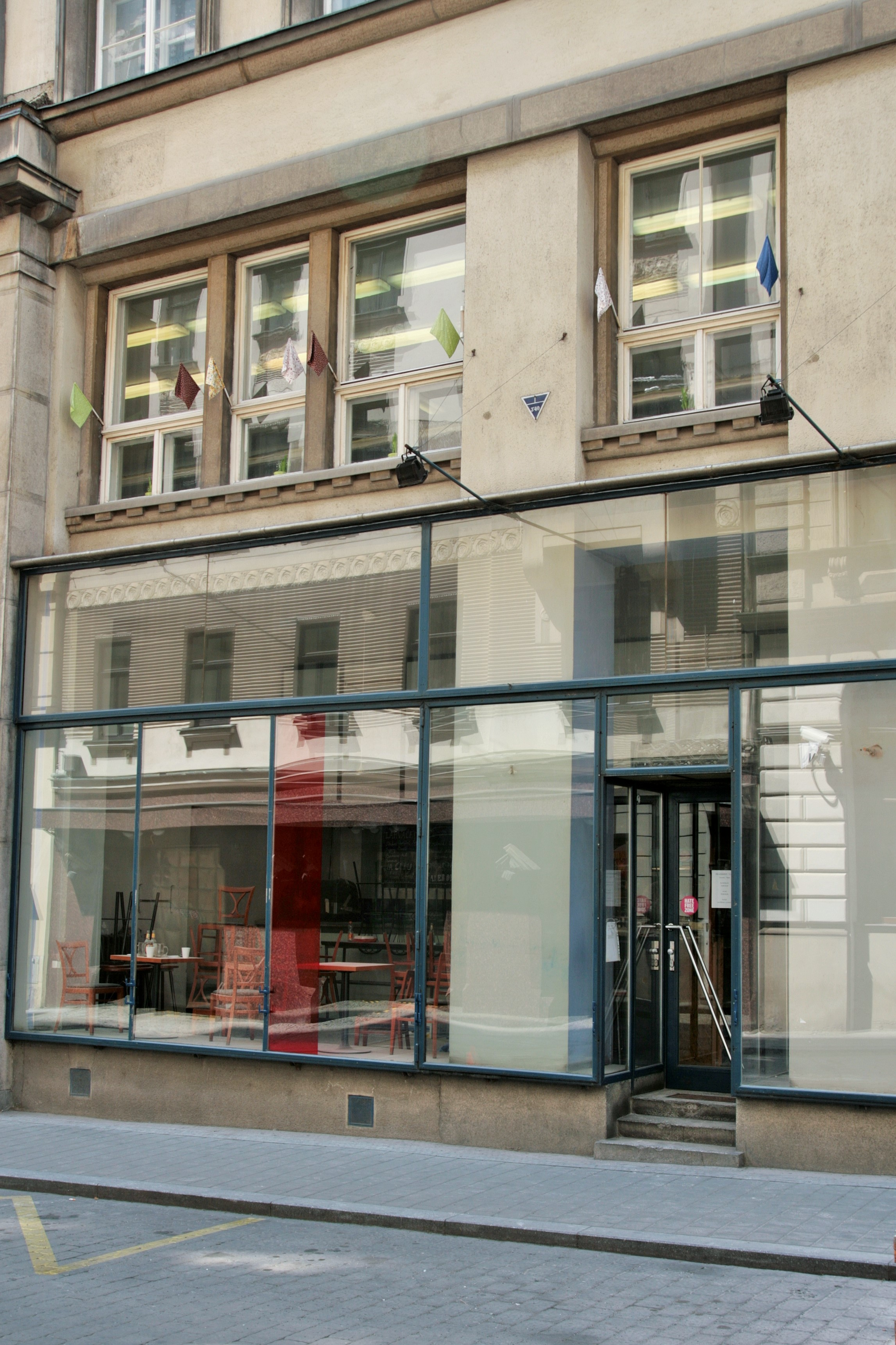 Kabinet múz na Sukově ulici č. o. 4 (č. p. 49) v Brně. Stav při vnitřních stavebních úpravách v průběhu divadelních prázdnin 2015.